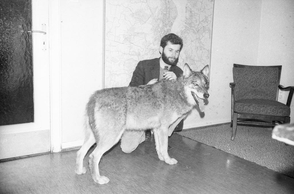 Mit dem Verhaltensforscher und Wolfsexperten Erik Zimen vom Institut für Haustierkunde der Christian-Albrechts-Universität (CAU).